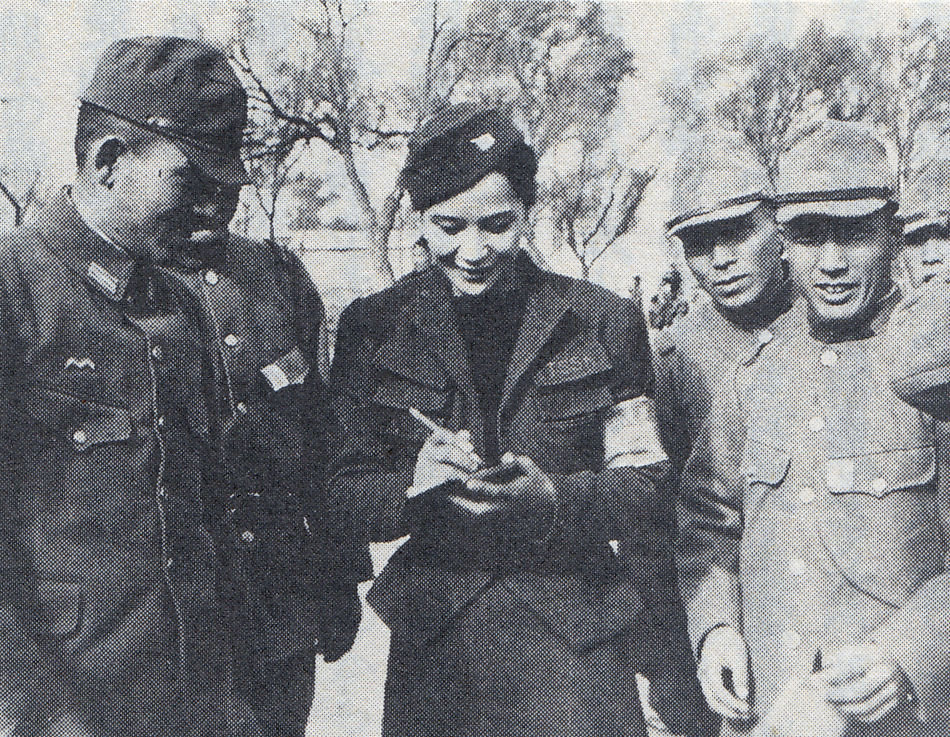 北支慰問中の水の江瀧子